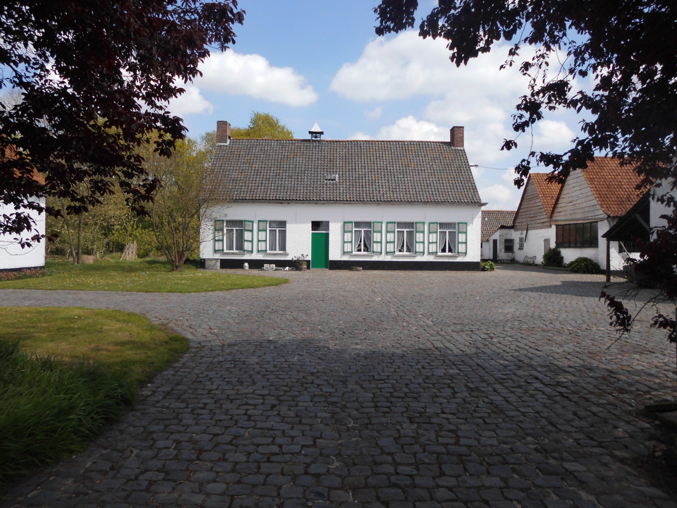 Boerderijwoning - Groot Burkelkalseide - Maldegem - Oost-Vlaanderen - België